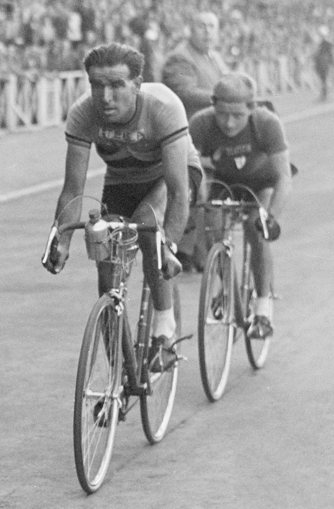 Tour de France, 2e etappe Reims-Brussel. Finish, Roger Lambrecht (België) en Jacques Marinelli (Frankrijk)